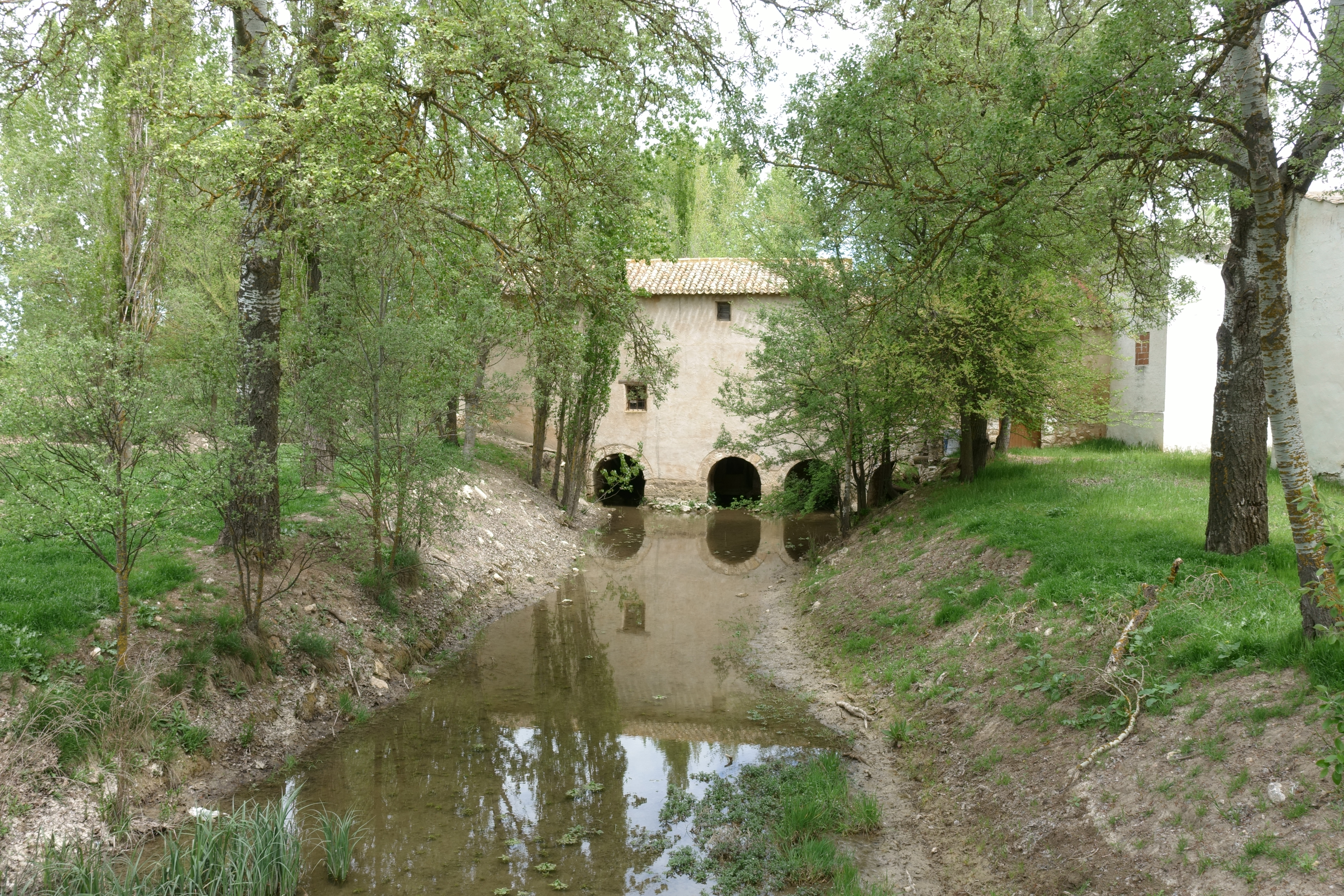 Molino del Blanco, Carrascosa de Haro (Cuenca, España).